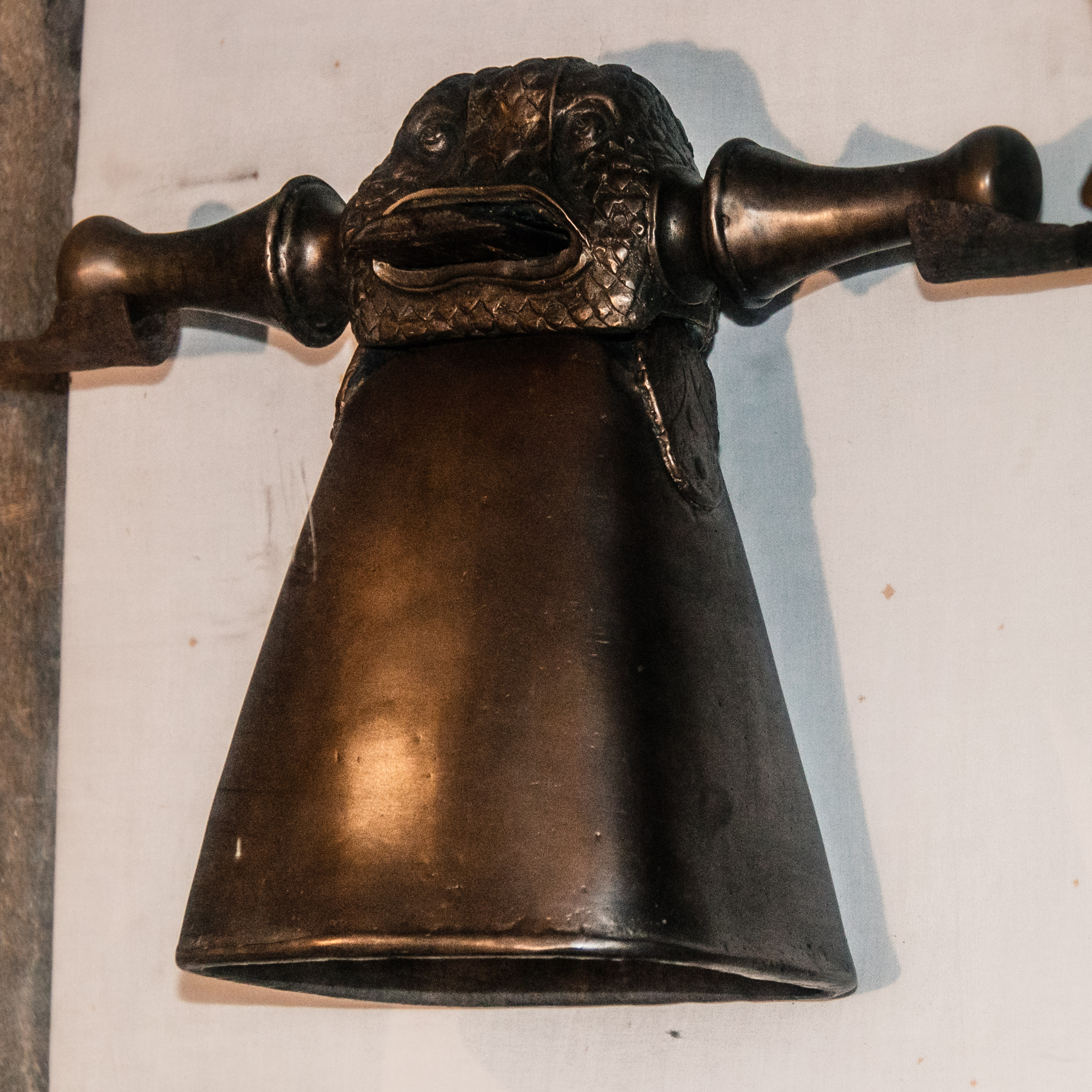 Réplique de la cloche celtique de saint Paul-Aurélien, datant de l’époque carolingienne, l’une des plus anciennes de Bretagne, présentée dans la cathédrale Saint-Paul-Aurélien de Saint-Pol-de-Léon.